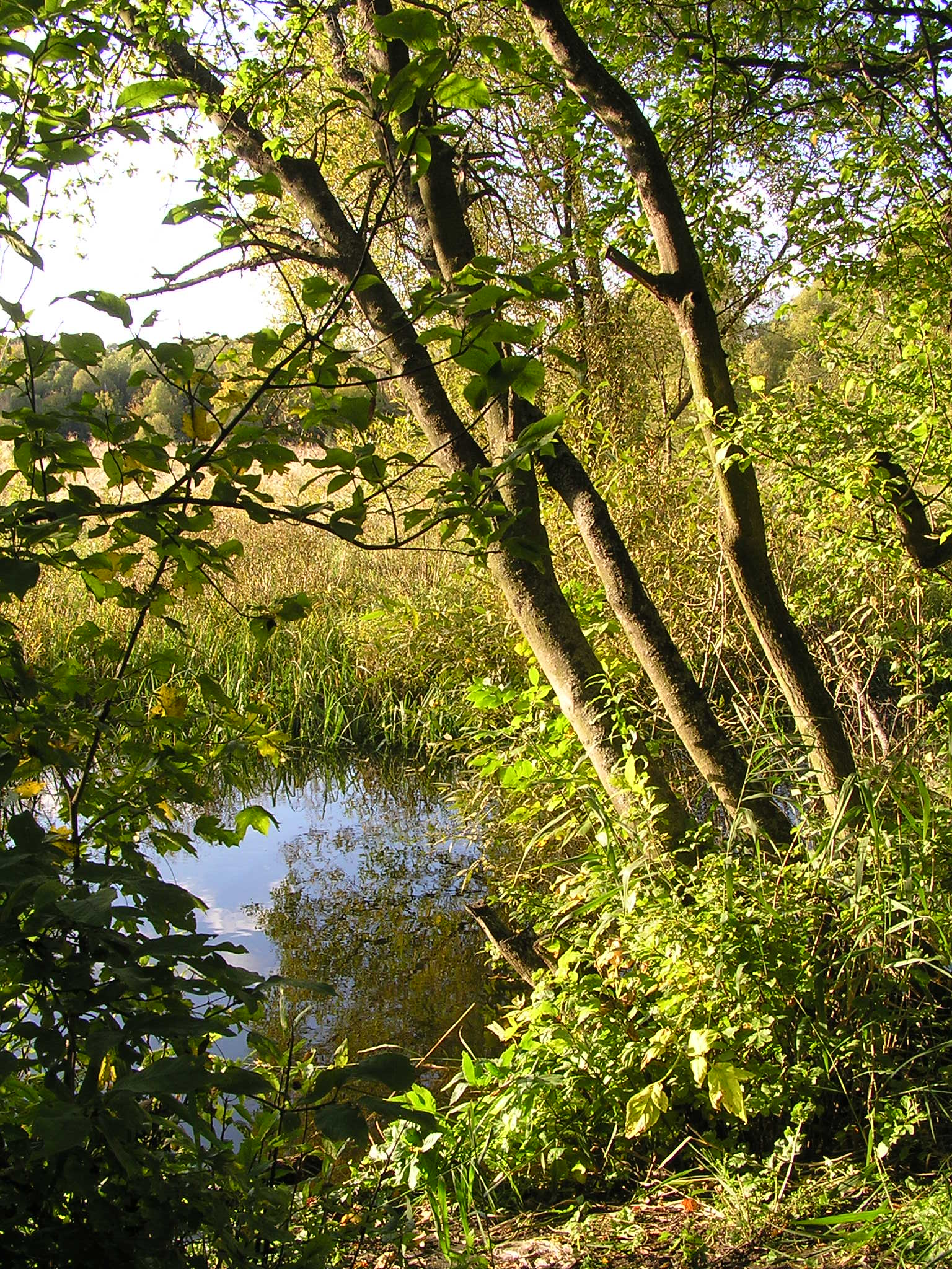 Територія колишньої садиби мистецької родини Лансере–Бенуа–Серебрякових, с.Нескучне, Харківський р-н., Харківська обл.